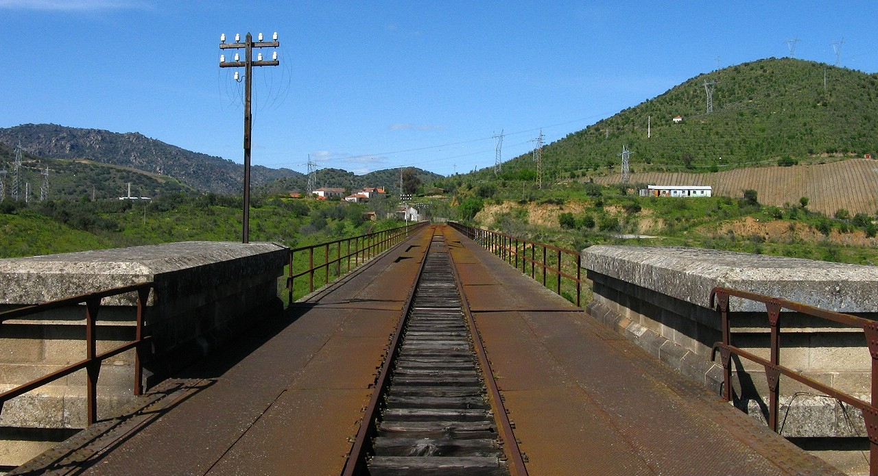 20 anos depois de passar o último comboio... Embora mantenha os carris intactos, o mesmo não se pode dizer de algumas travessas...